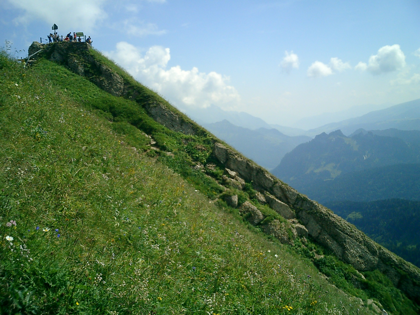 Gipfel-Fotografie von Südwesten aus auf den Speer (Berg)